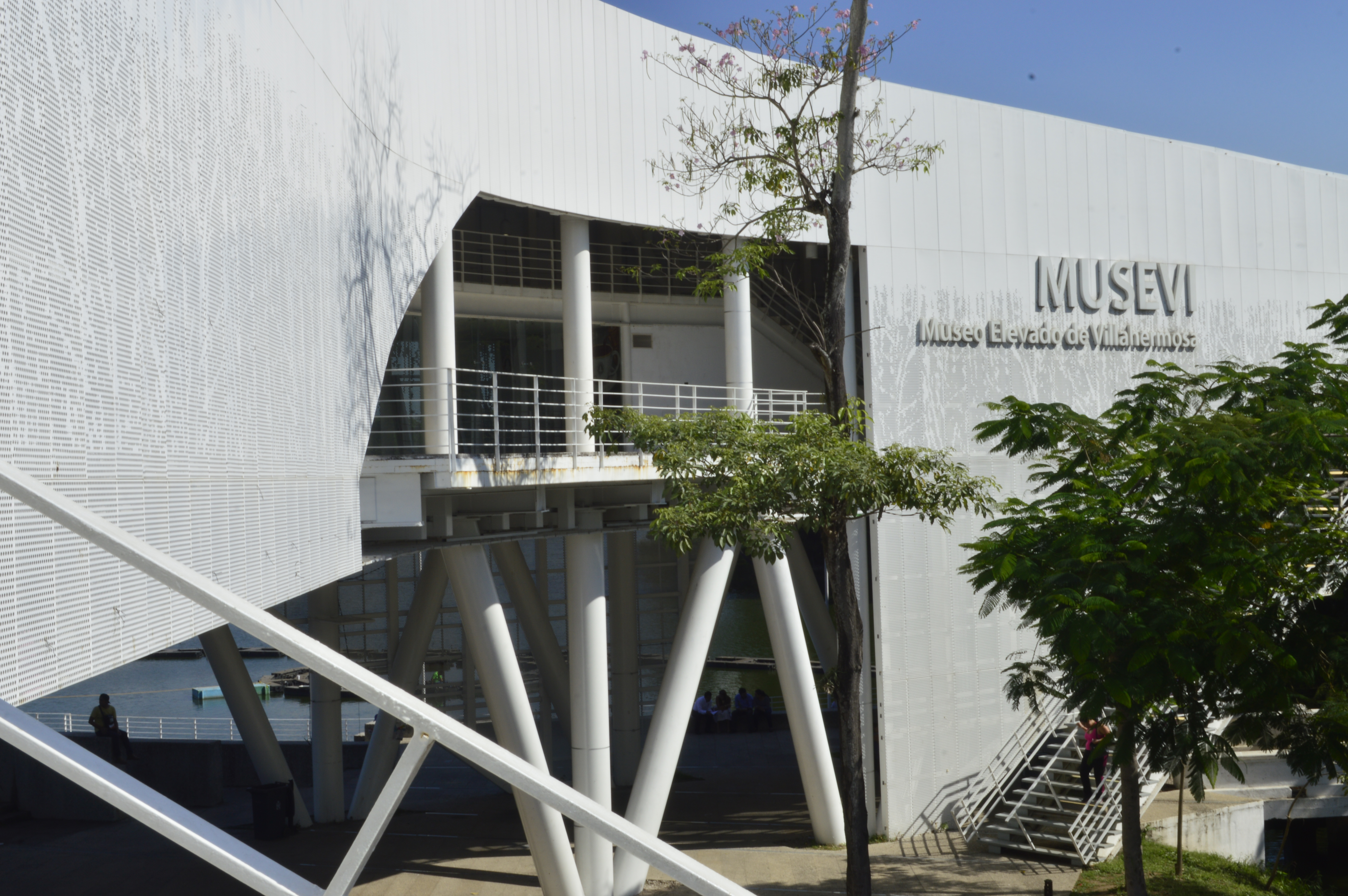 Museo Elevado de Villahermosa, localizado en el "Corredor turístico de las Ilusiones"